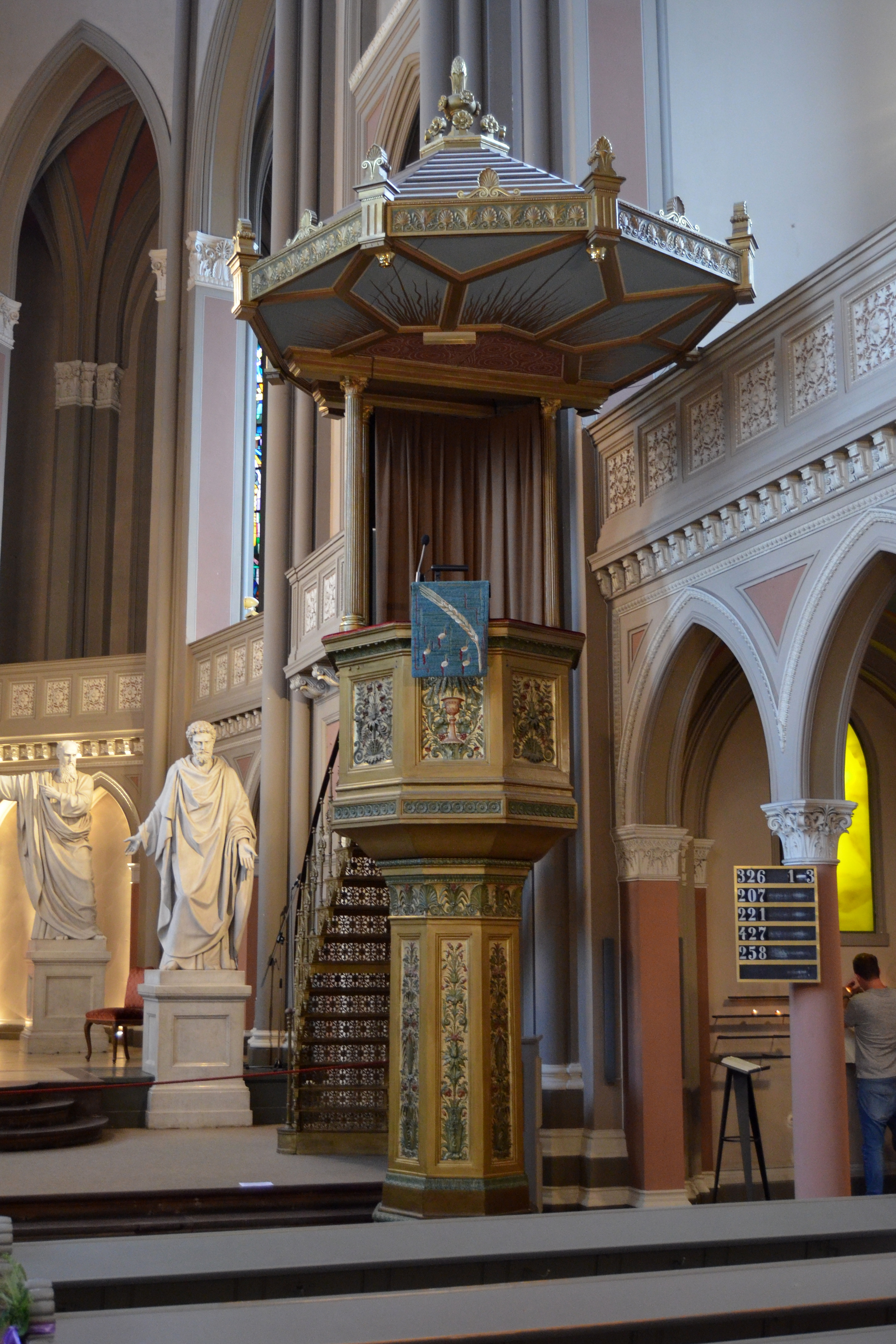 Preekstoel